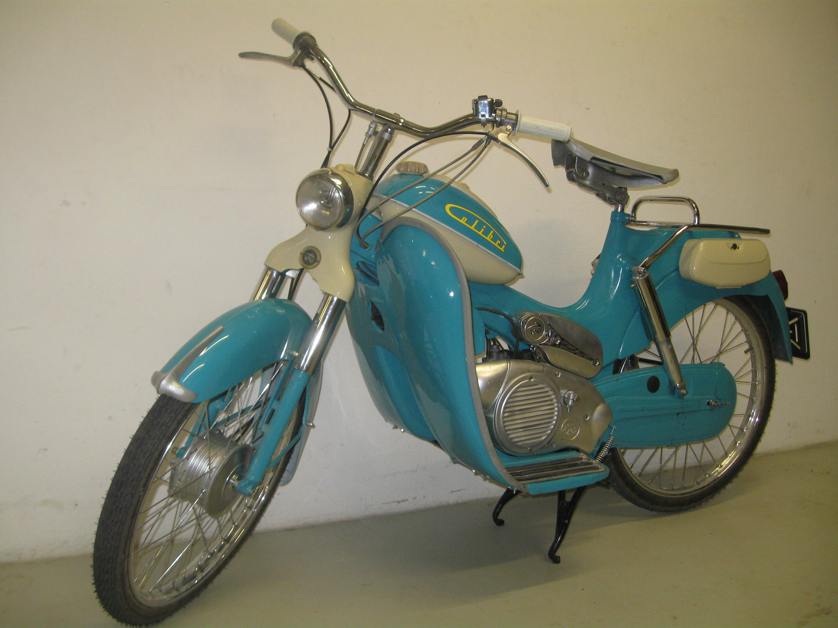 Moped Tomos Colibri 12, letnik 1960.